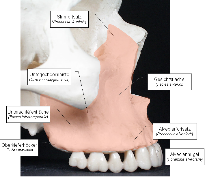 Abbildung des menschlichen Oberkiefers